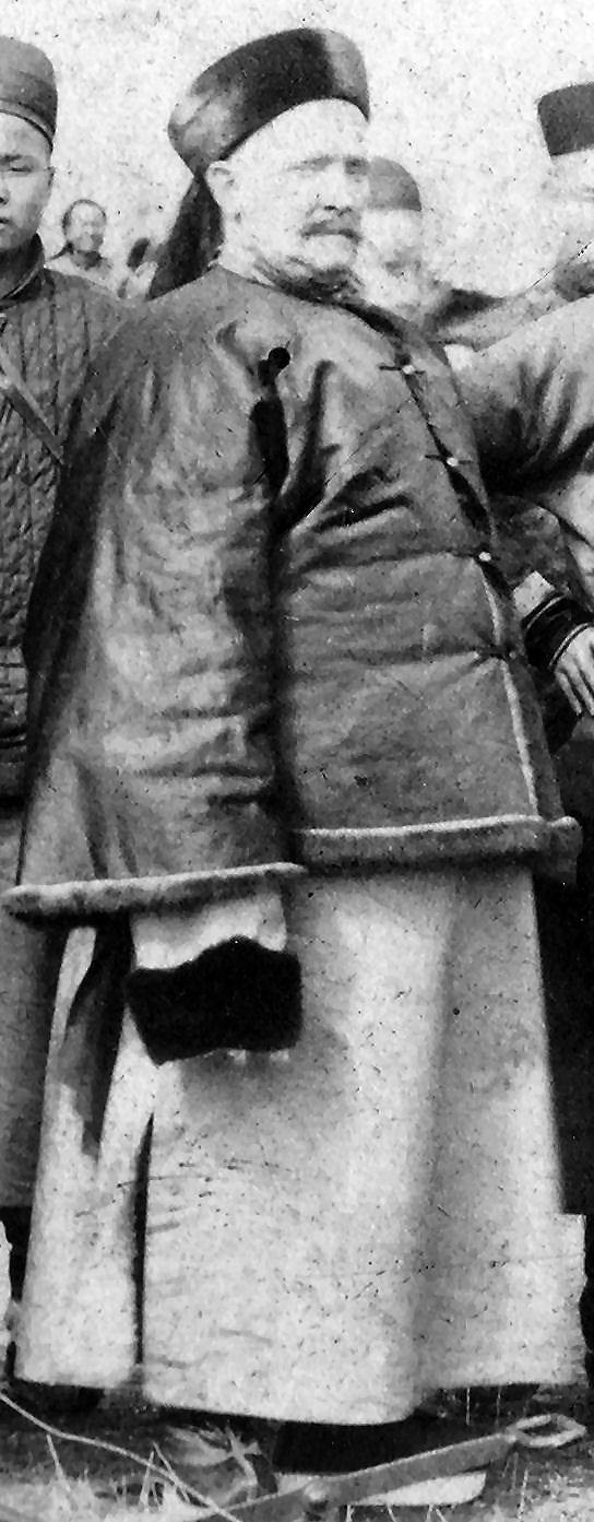 photo représentant Lin Fuchen, né Paul Splingaerd, citoyen belge ayant fait carrière comme fonctionnaire chinois